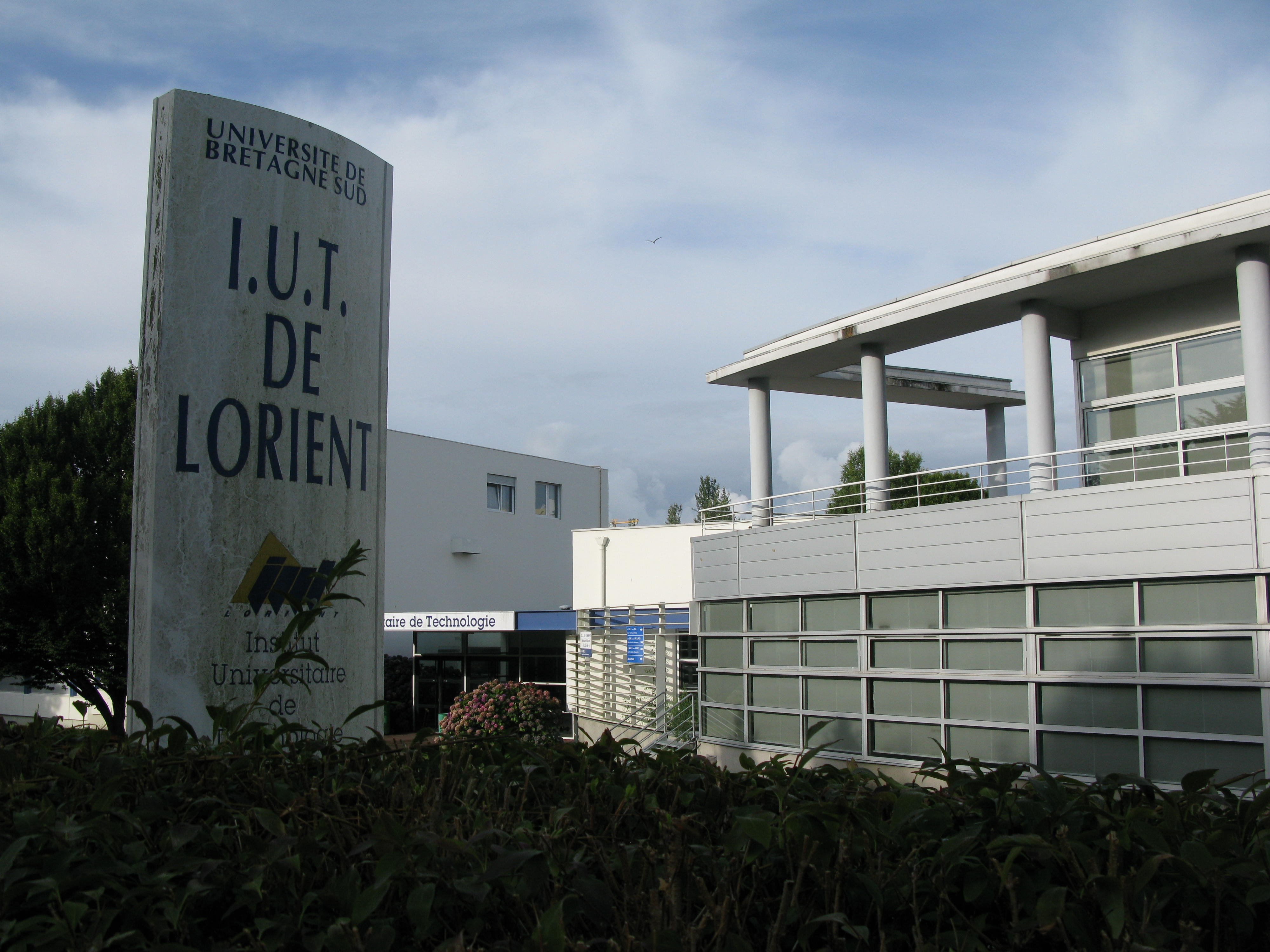 Entrée des IUT de l'Université de Bretagne Sud à Lorient